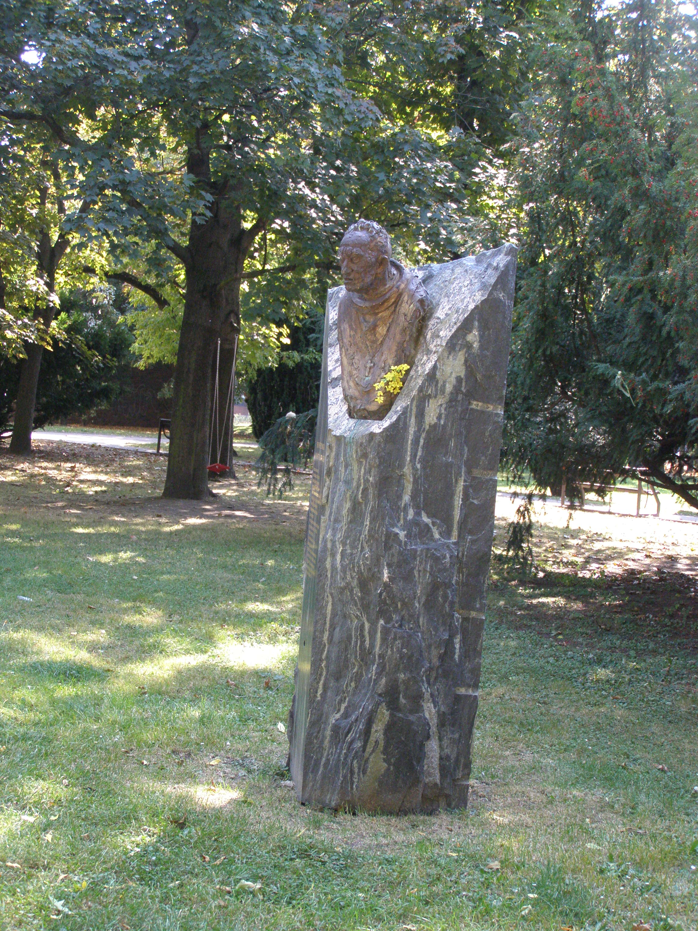 U příležitosti opatova 100. výročí narození byl dne 20. dubna 2013 odhalen v Kolíně v parku J. A. Komenského pomník s bustou opata Jana Nepomuka Anastáze Opaska. Autorem pomníku je akademický sochař Stanislav Hanzík. Pomník posvětil opat Strahovského kláštera Michael Josef Pojezdný za přítomnosti starosty města Víta Rakušana a občanů Kolína. Pomník se nachází za budovou Komerční banky a. s. na GPS souřadnicích: 50°1'34.819"N, 15°12'16.428"E. Celkový pohled na pomník.